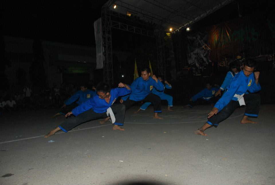 para pesilat THS latihan di Jawa Barat